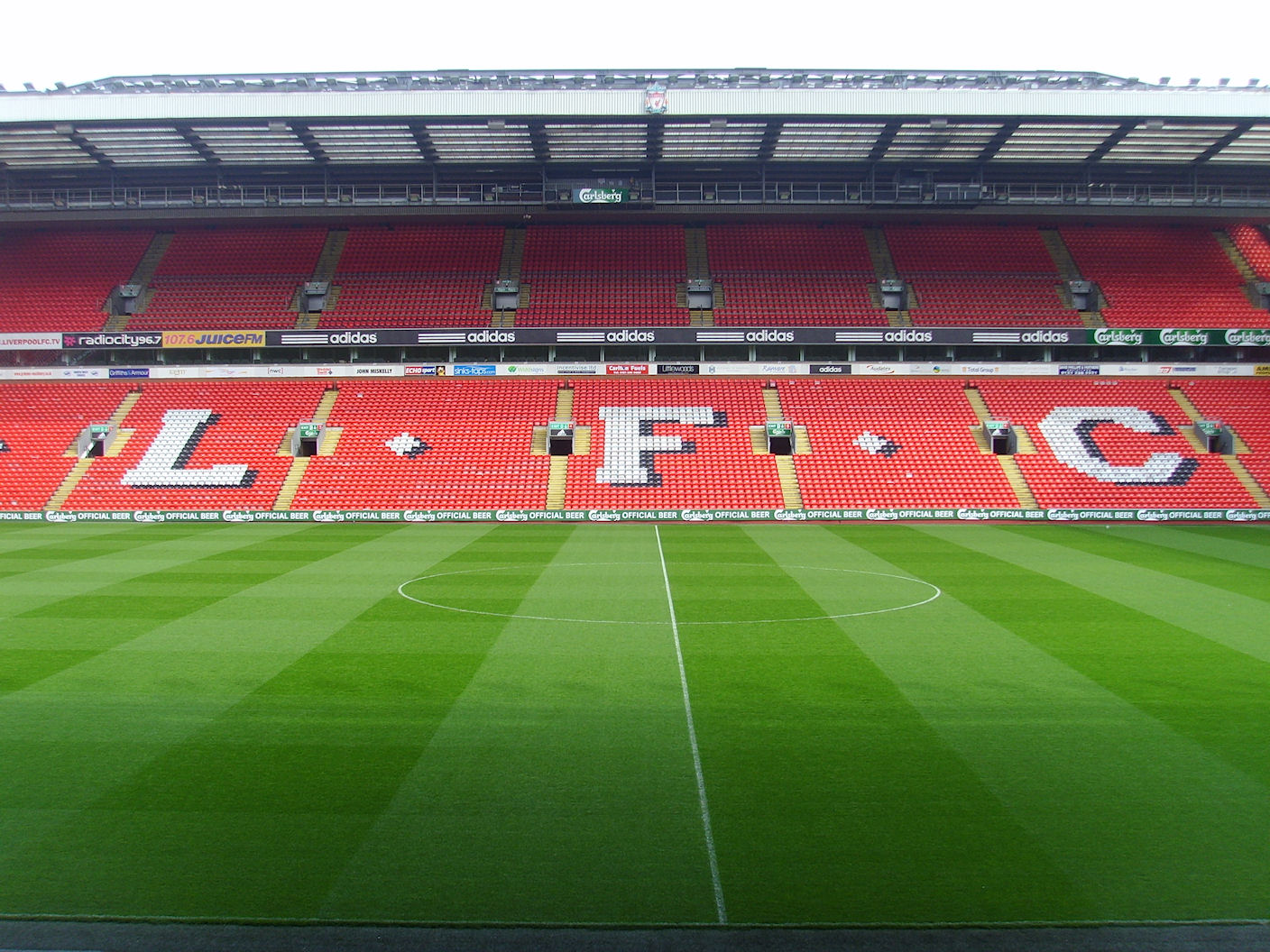 Anfield